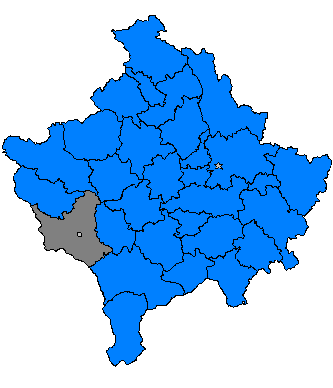 Đakovica, 2006